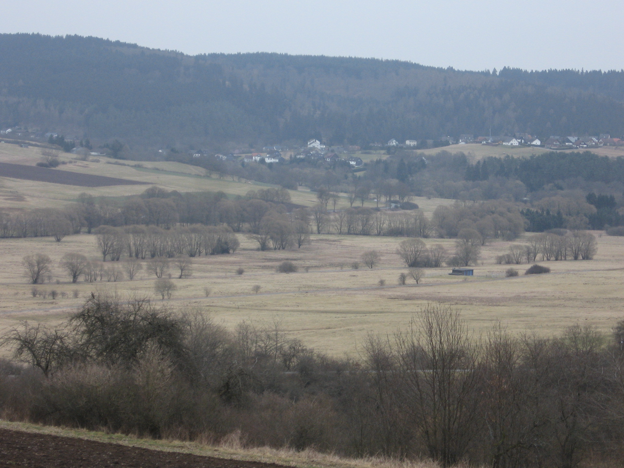 Naturschutzgebiet Nuhnewiesen östlich von Hallenberg von Südwesten aufgenommen. Im Bildhintergrund Hessen mit Somplar und Wäldern in Hessen.